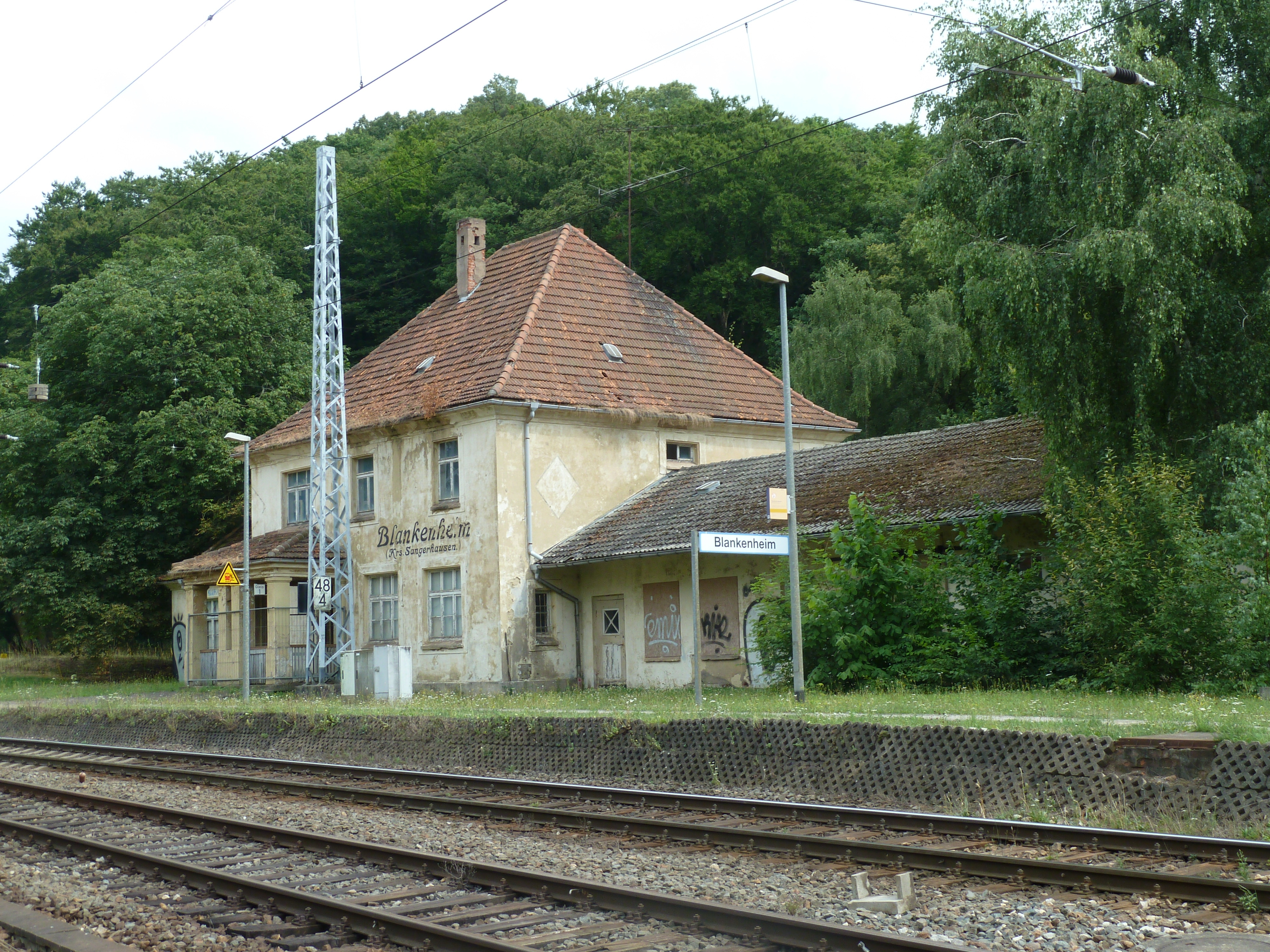 Bf. Blankenehim (Kr Sangerhausen), Empfangsgebäude,Bahnsteigseite